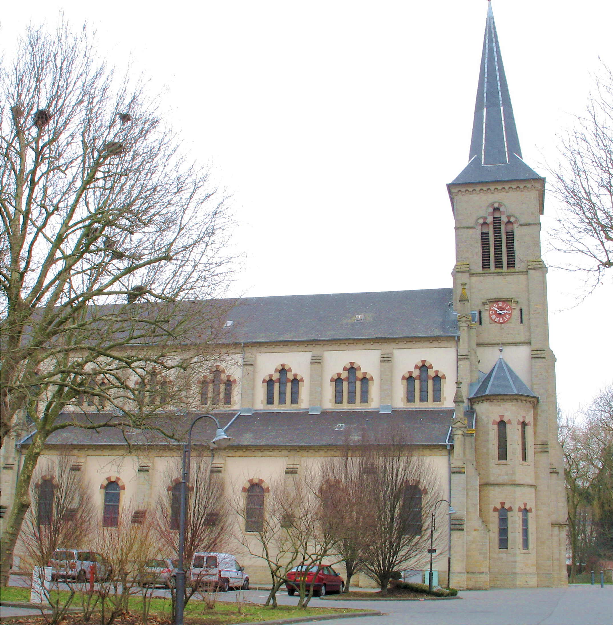 Kirche Mariä Himmelfahrt in Bettemburg, Luxemburg